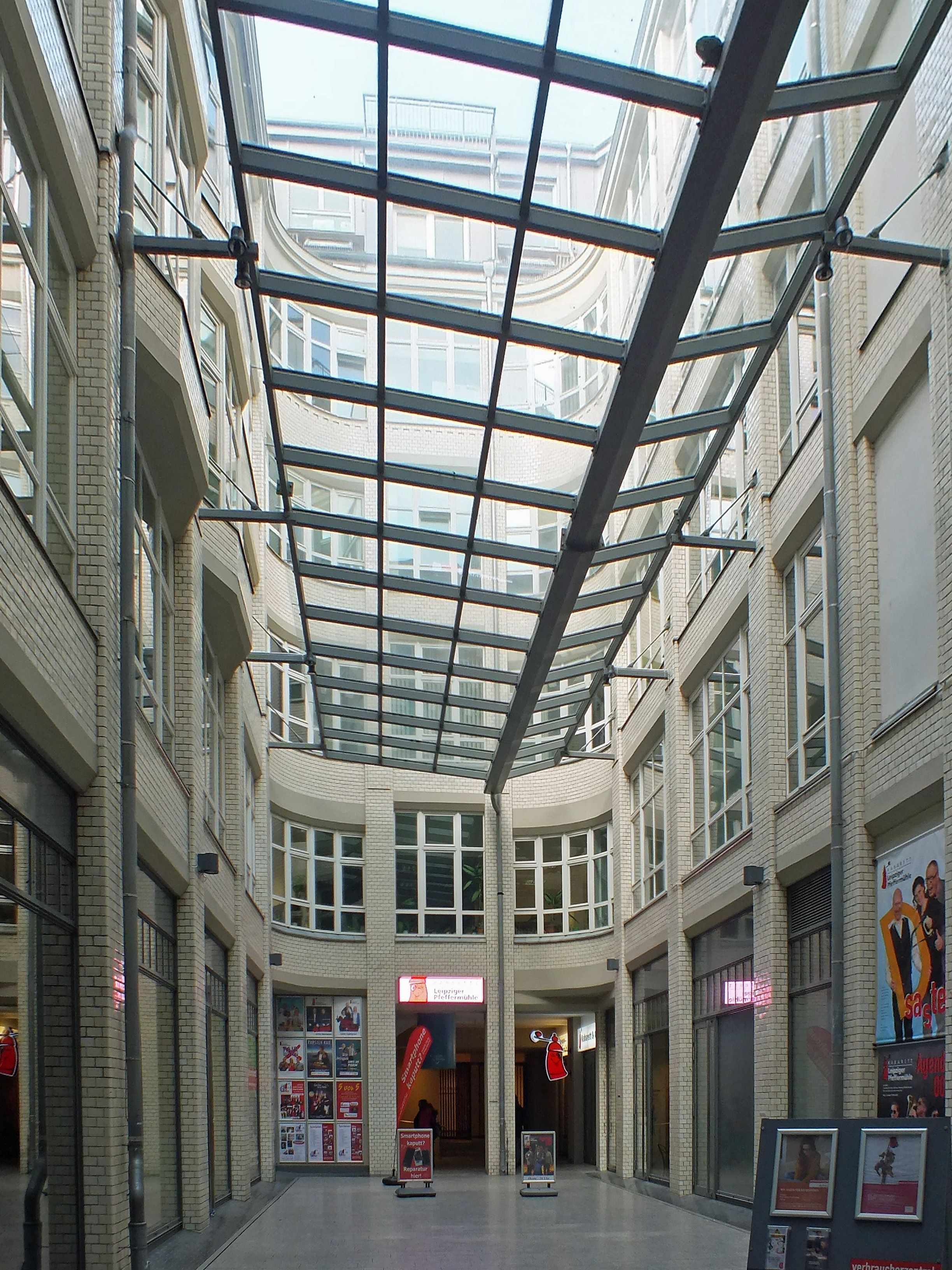 Kretschmanns Hof in Leipzig, Hofbereich nach Westen